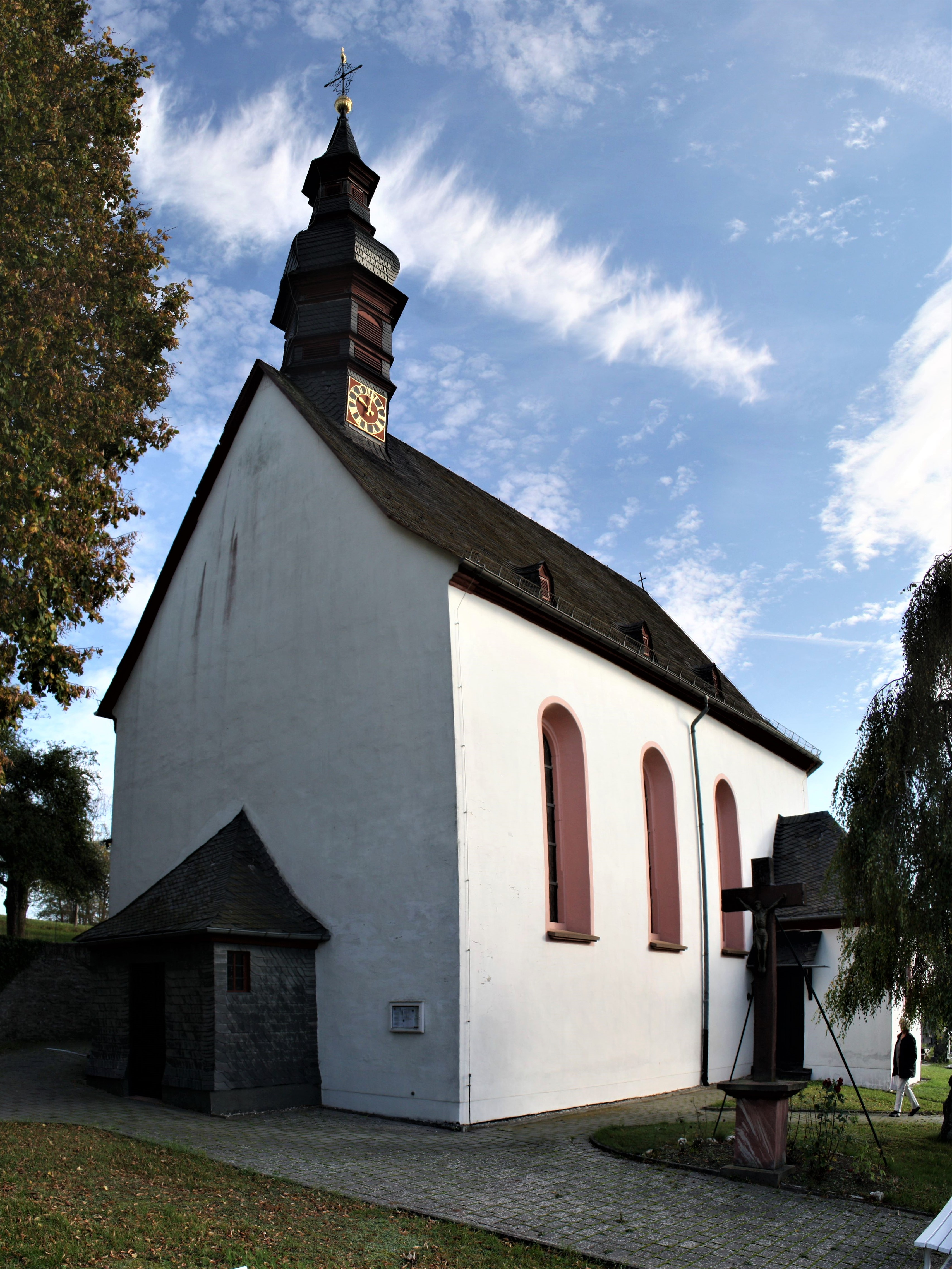 kath. St.Nikolaus Kirche, Espenschied ein Stadtteil von Lorch, Rheingau